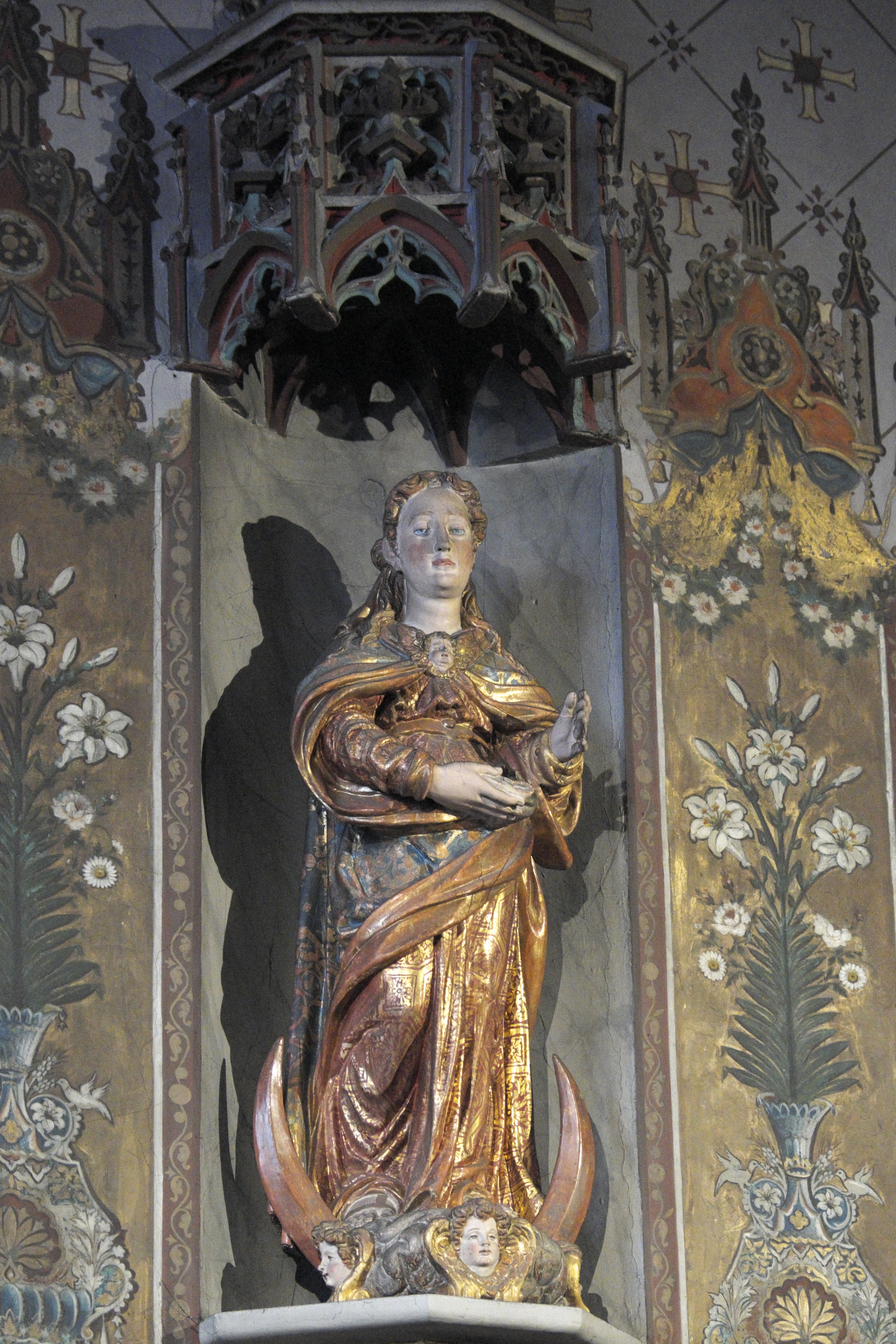 Katholische Kirche Saint-Pierre in Yzeure im Département Allier (Auvergne-Rhône-Alpes/Frankreich), Mondsichelmadonna aus dem 18. Jahrhundert